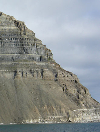 Svalbard Norveç'te Isfjord kuzey kıyısında stratigrafik sütun. Kaya türlerinin dikey ardışıklığı (tortul fasiyeleri temsil eder) paleoortamdaki yanal değişiklikleri yansıtır.